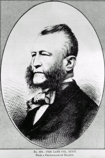 Augustus Gugy